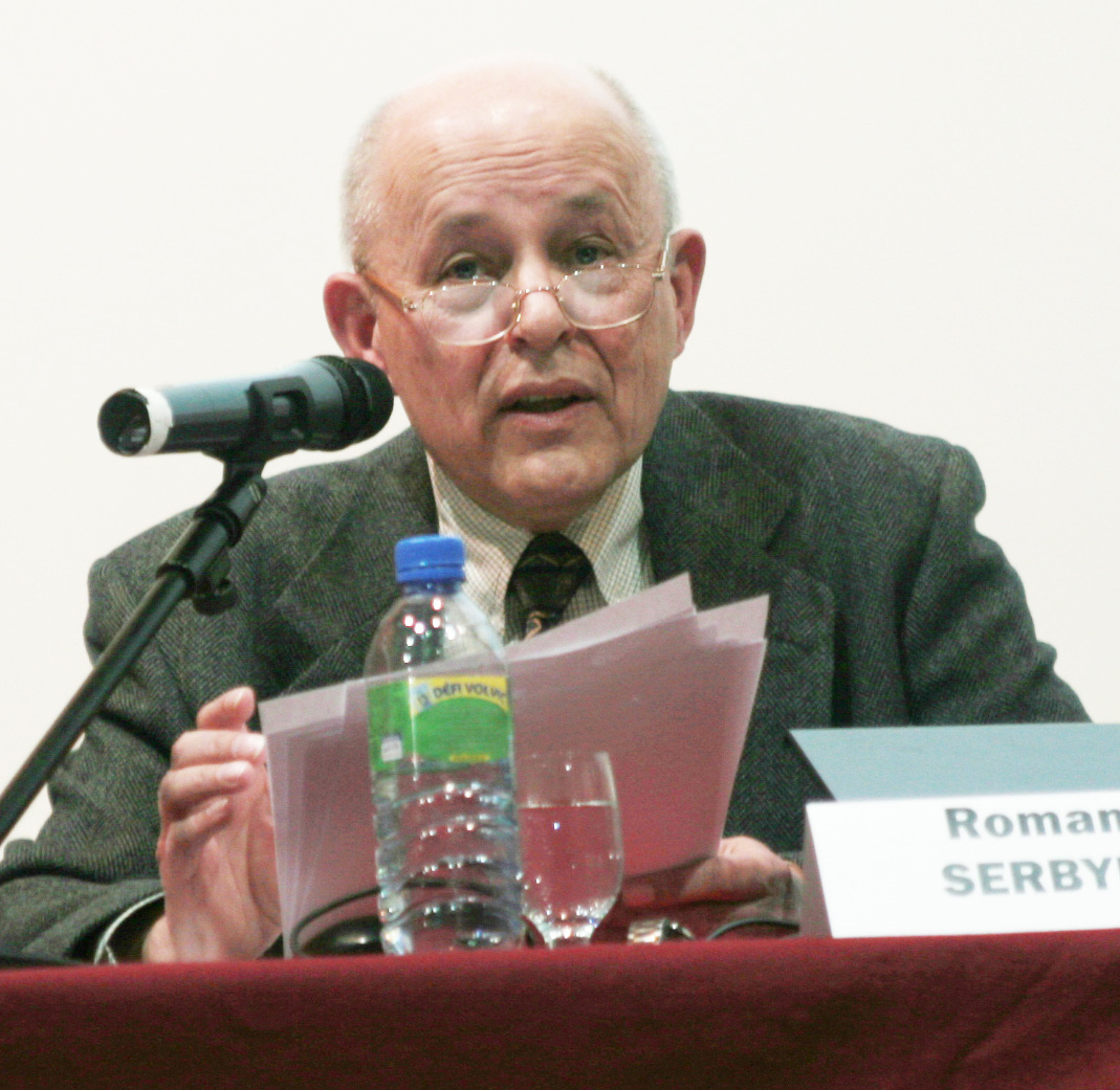 Roman Serbyn le 5 novembre 2009 lors du colloque international "Sortir du communisme, changer d'époque" organisé par Fondapol en partenariat avec la Fondation Robert-Schuman.